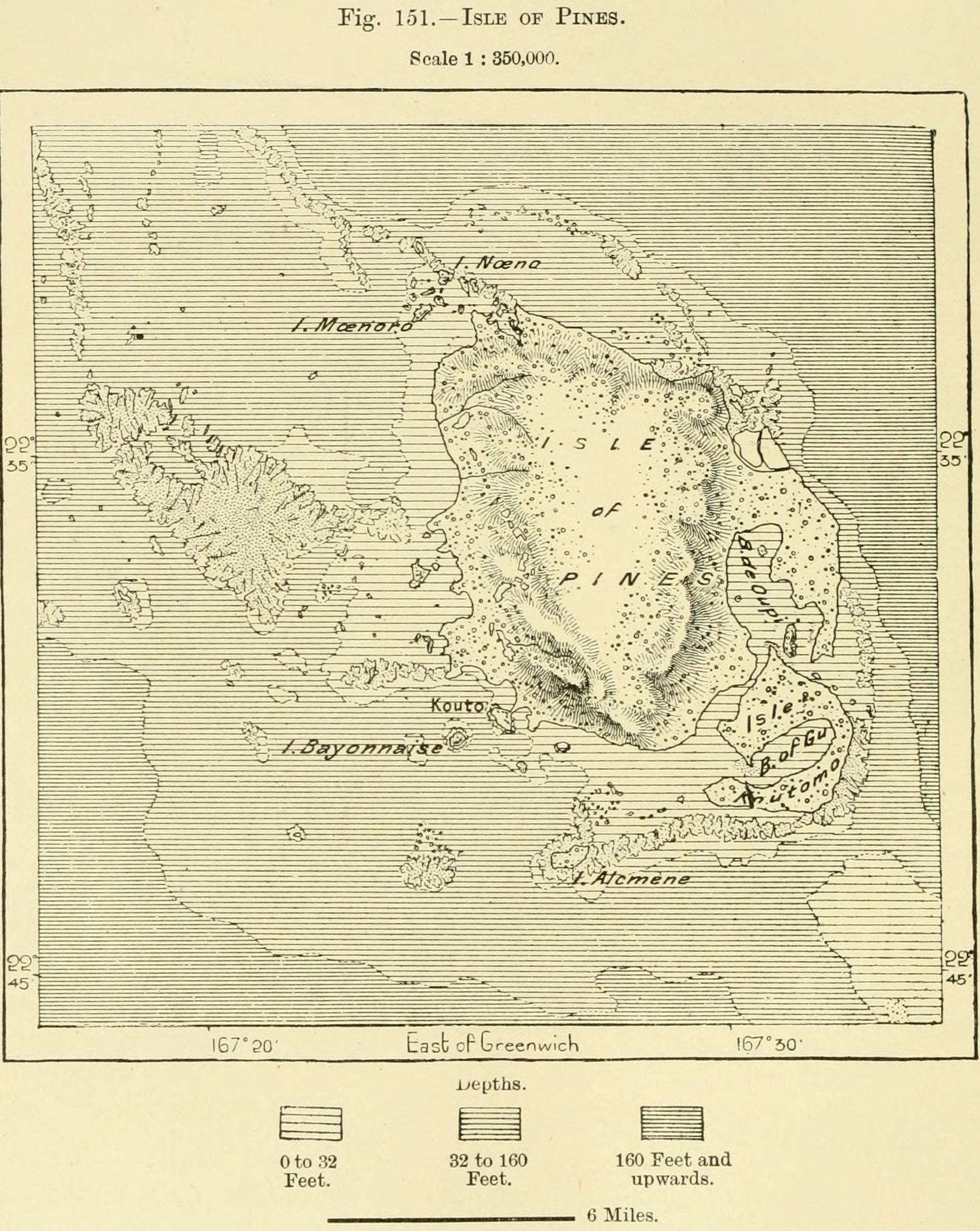 Karte der Île des Pins, Neukaledonien, Melanesien, Westpazifik